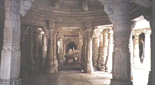 Temple de Ranakpur au Rajasthan Auteur : Utilisateur:Nataraja Statut : sous gfdl dans ce format Utilisateur:Nataraja